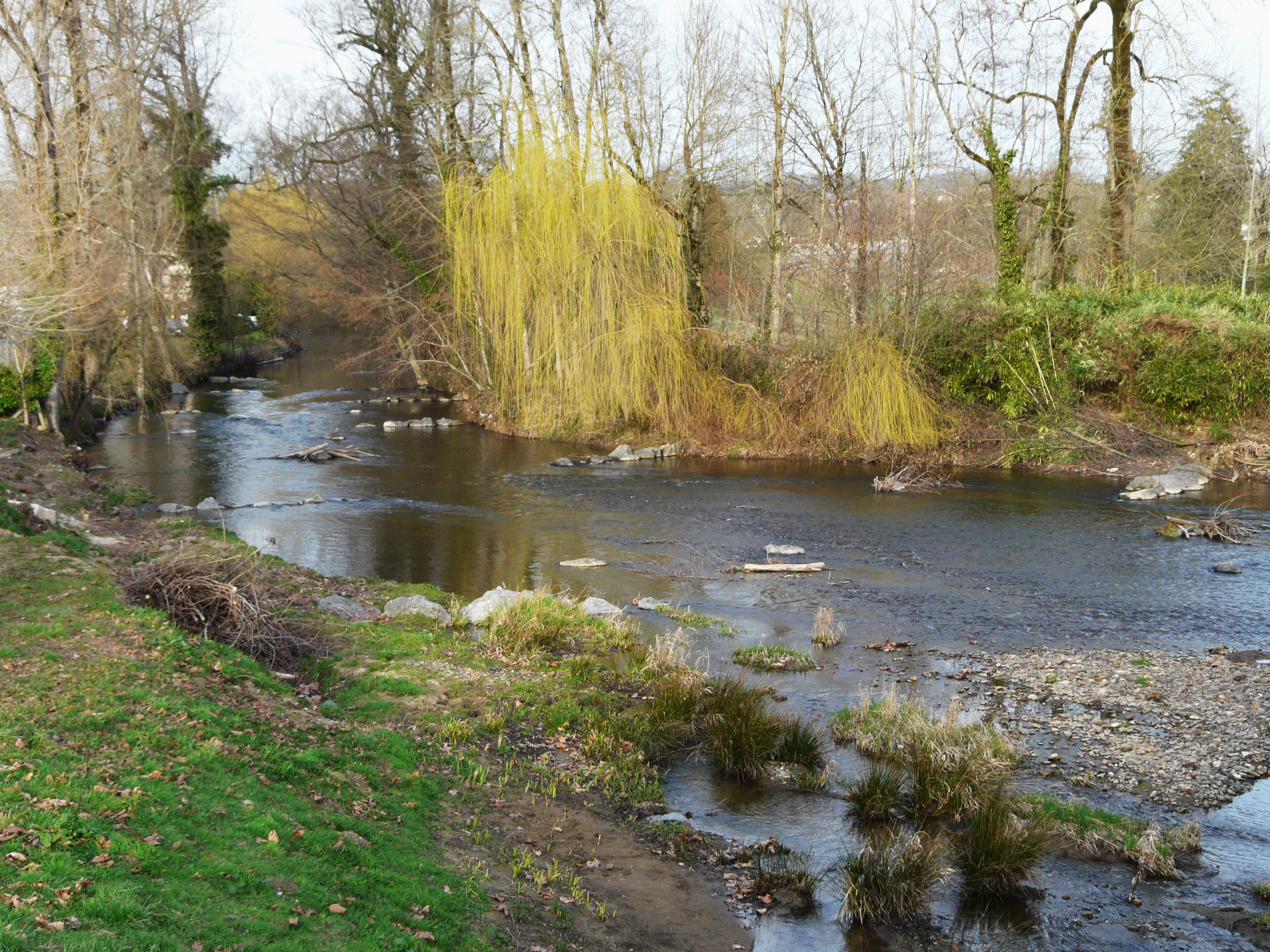 La Loue au pont de la RD 705, Saint-Médard-d'Excideuil, Dordogne, France. Vue vers l'amont.